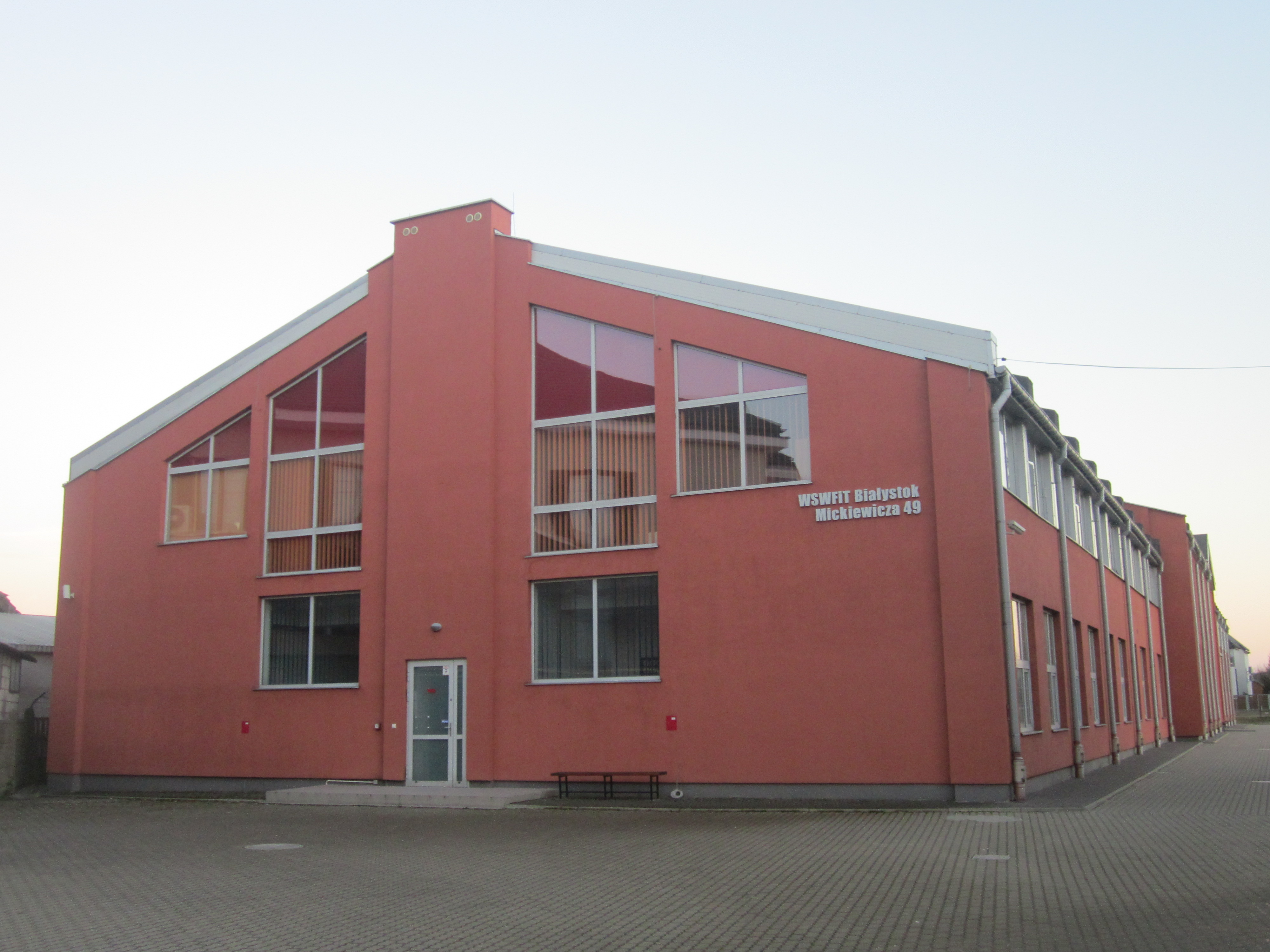 Białystok, ul. Mickiewicza 49.